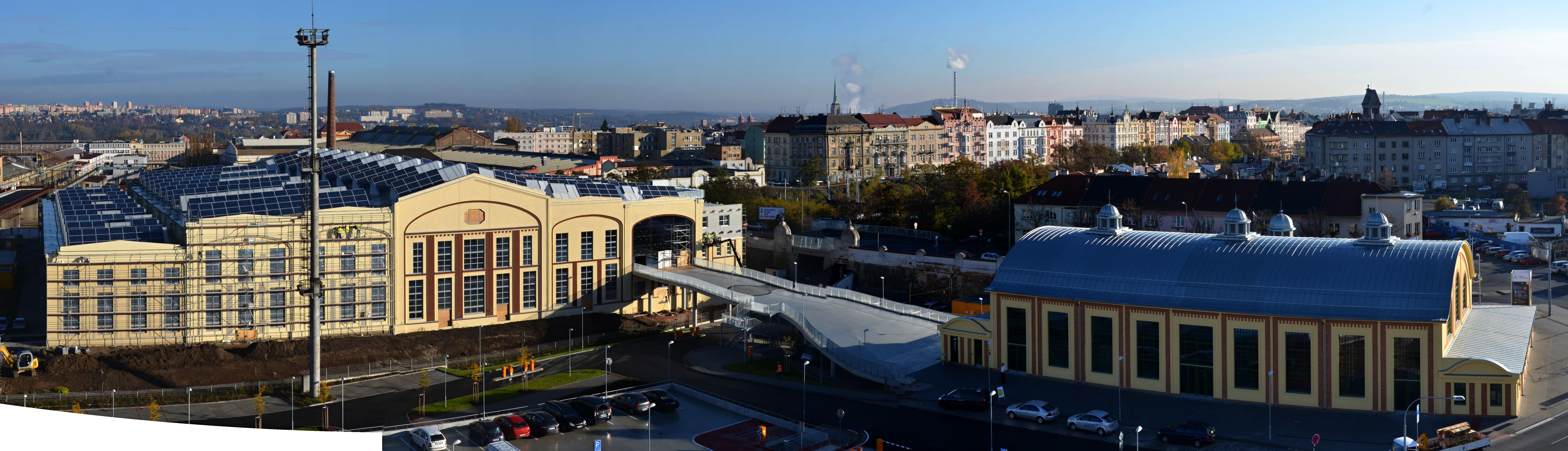 Techmania Science Center. Pohled ze střechy hlavní budovy ŠKODA TRANSPORTATION, a.s.